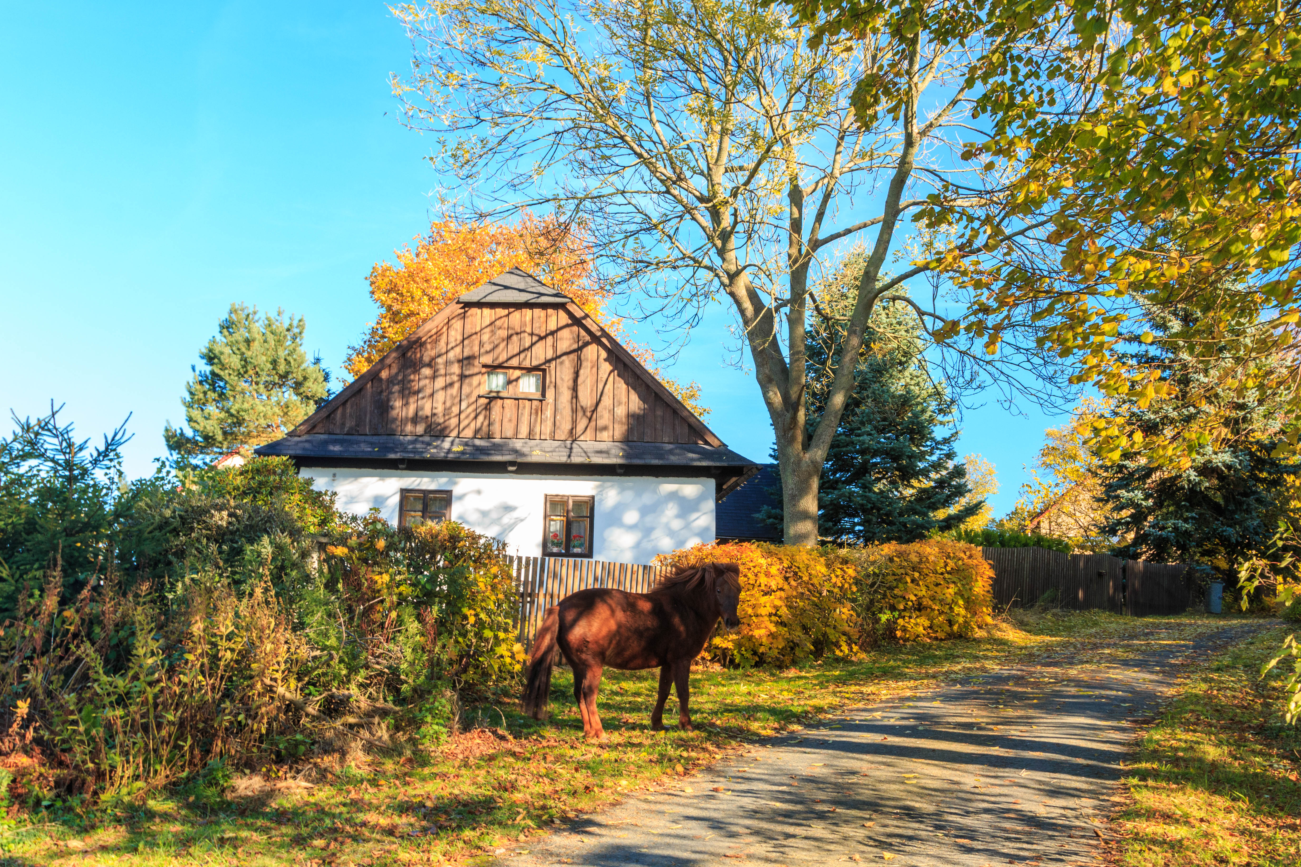 Horní Vestec čp. 10